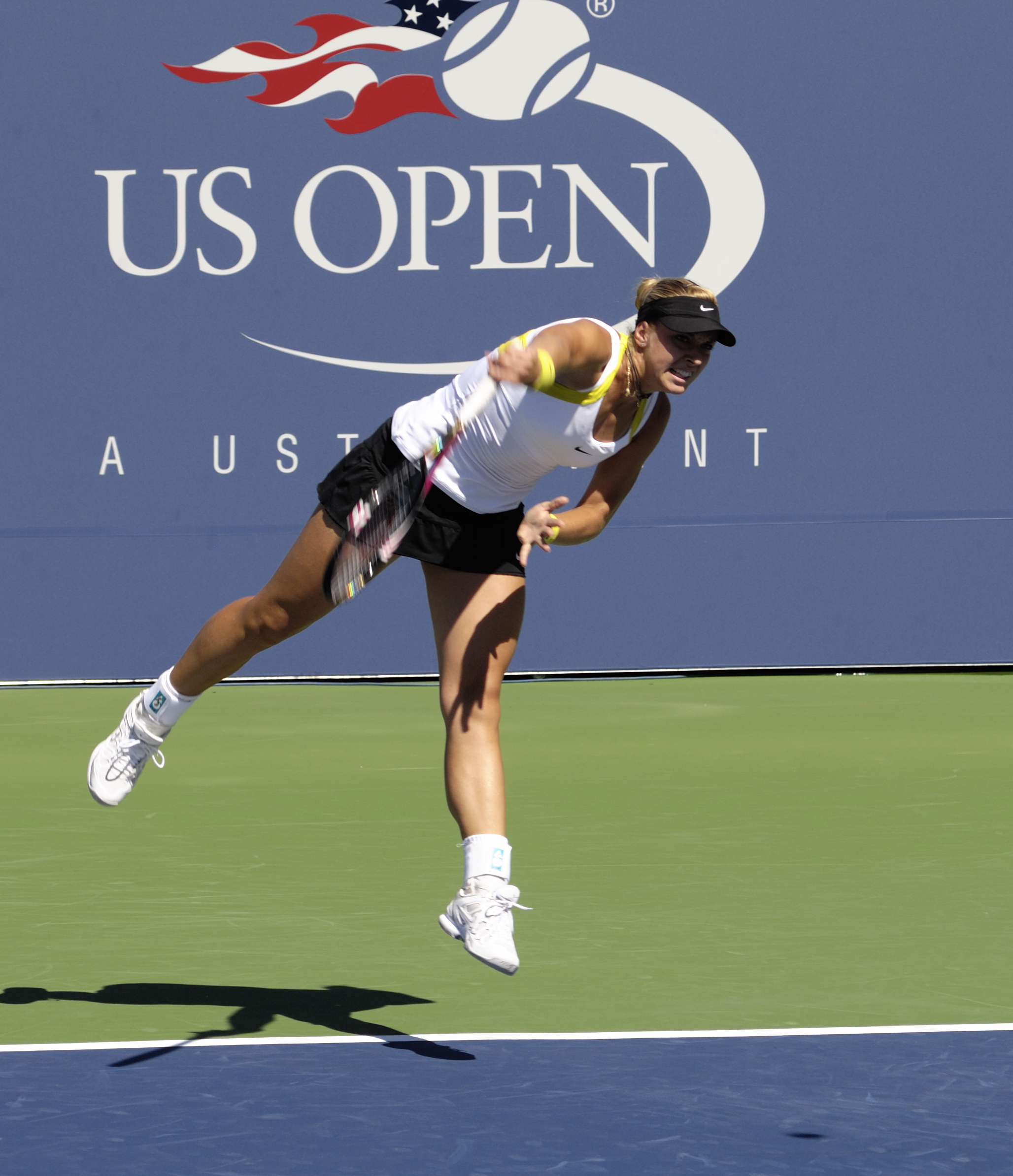 lisiki serve